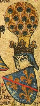 Louis II de Bourbon